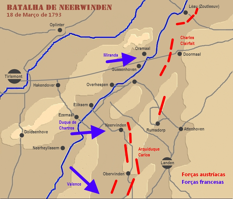 Mapa da Batalha de Neerwinden, 1793